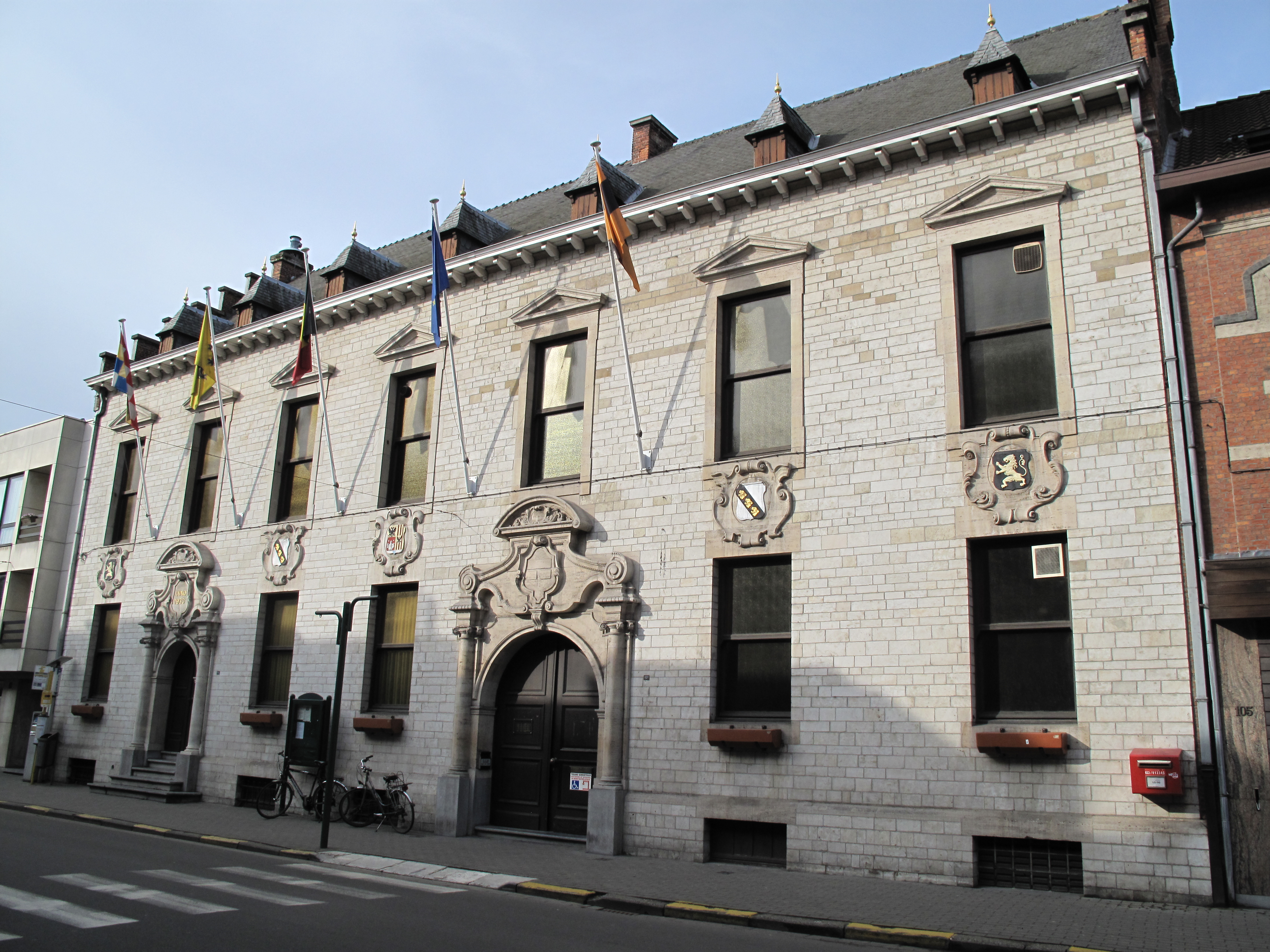 Gevel van het gemeentehuis van Willebroek